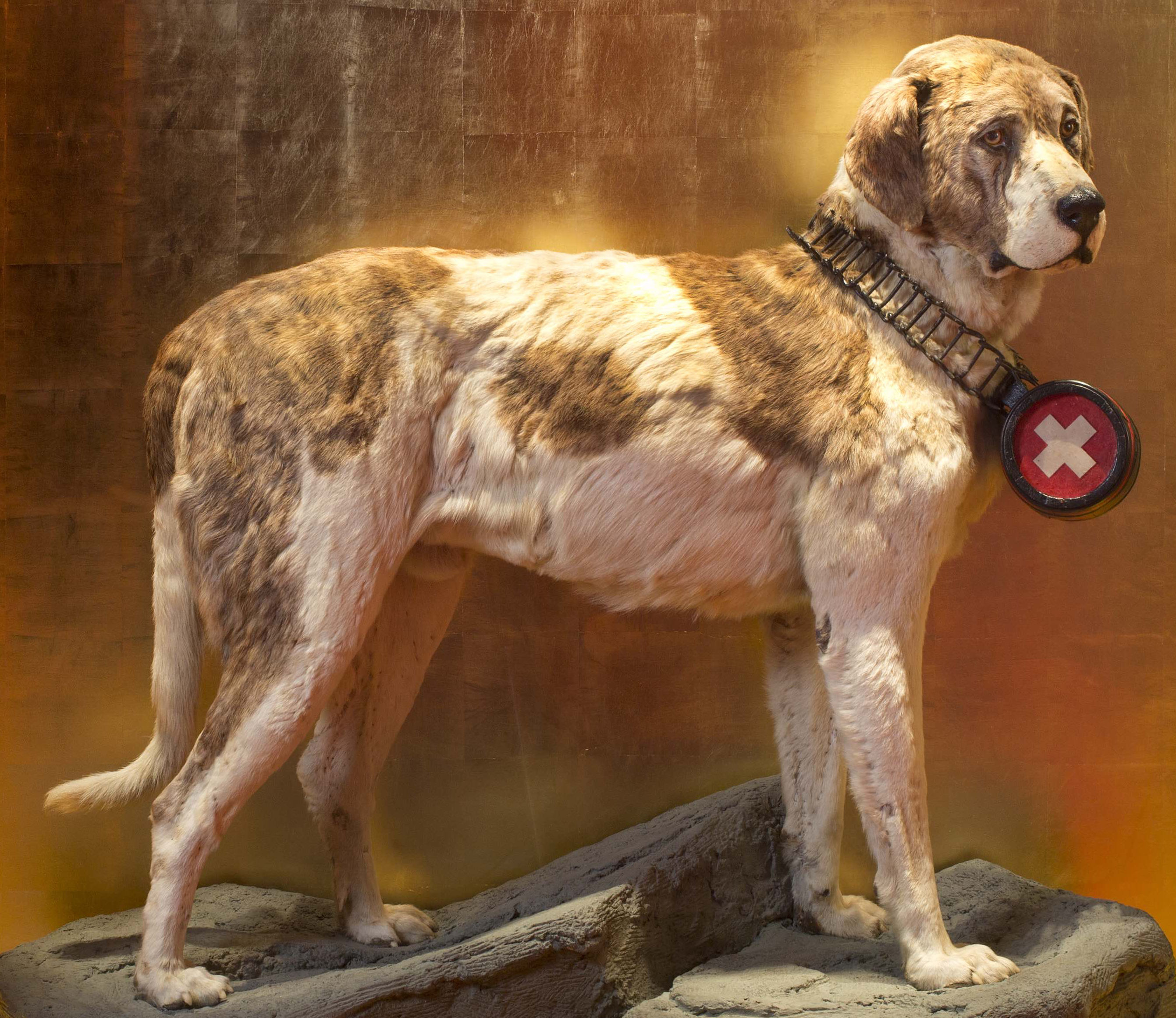 Der Bernhardiner Rettungshund Barry als Exponat im Naturhistorischen Museum Bern